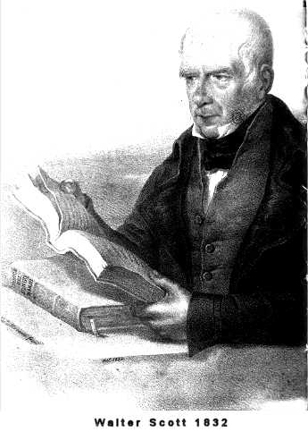 Walter Scott ritratto eseguito nel 1832 da Vincenzo Morani nato nel 1809, fratello di Domenico nato nel 1824